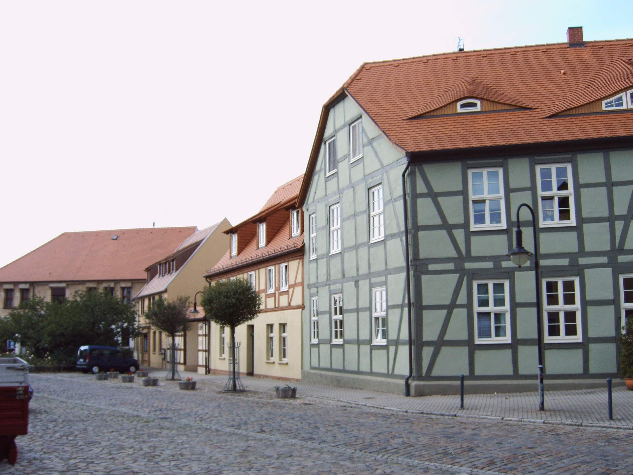 sanierte Häuser in der Friedensstraße in Wolmirstedt, 14. September 2005